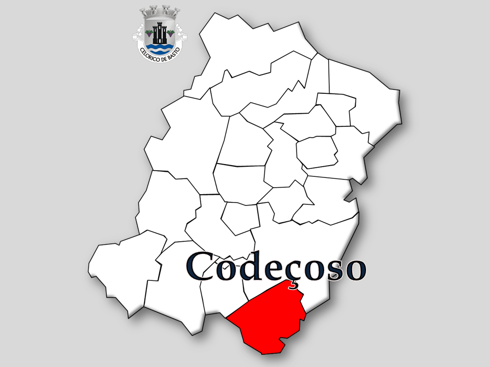 Censos 1864/2011